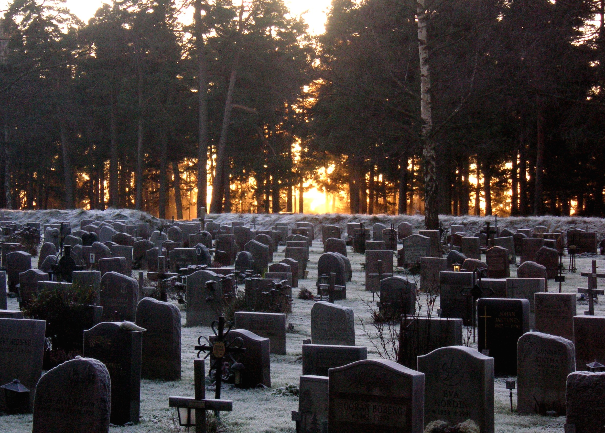 Skogskyrkogården i Stockholm, solnedgång.